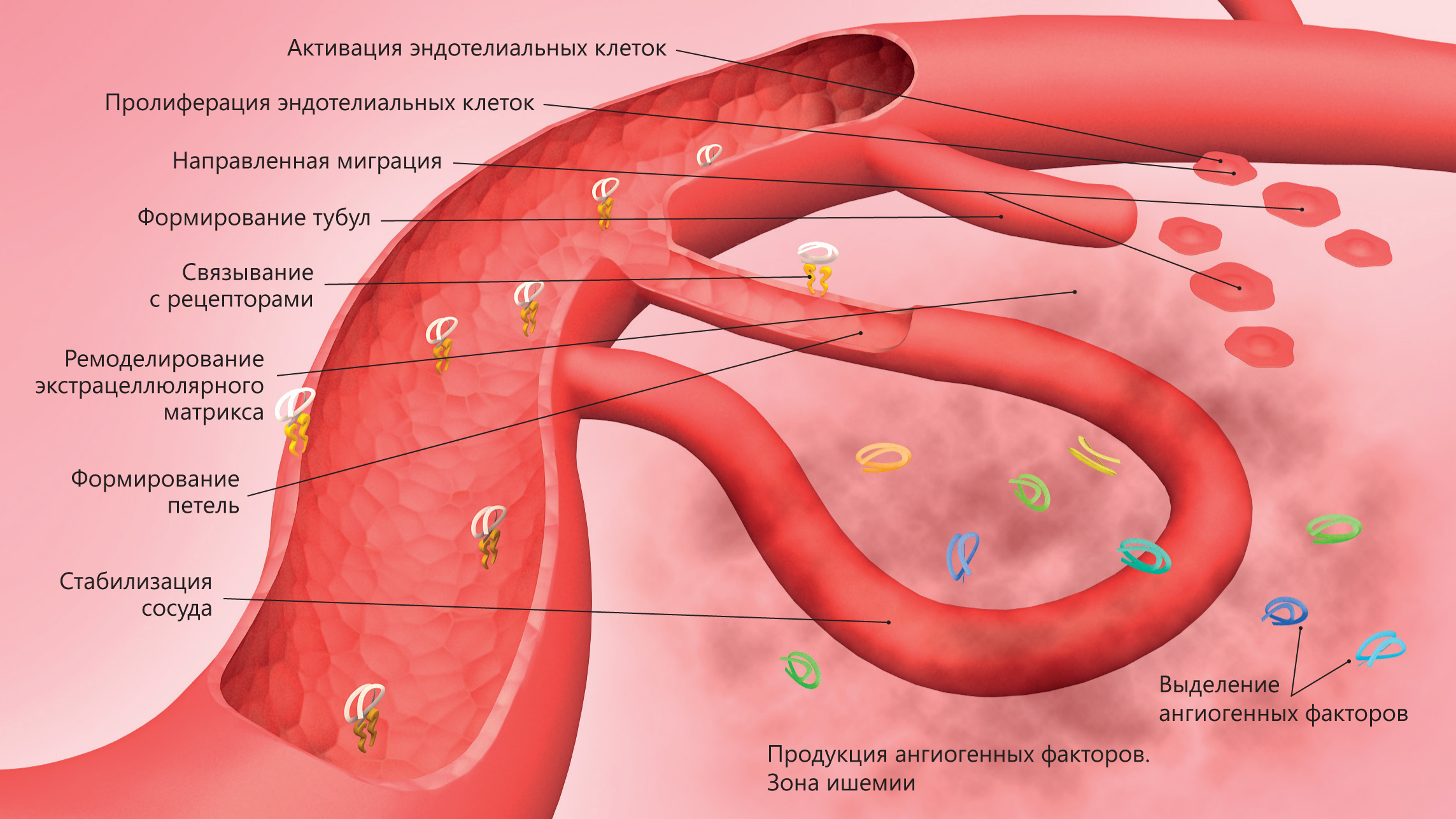 Введение генных конструкций